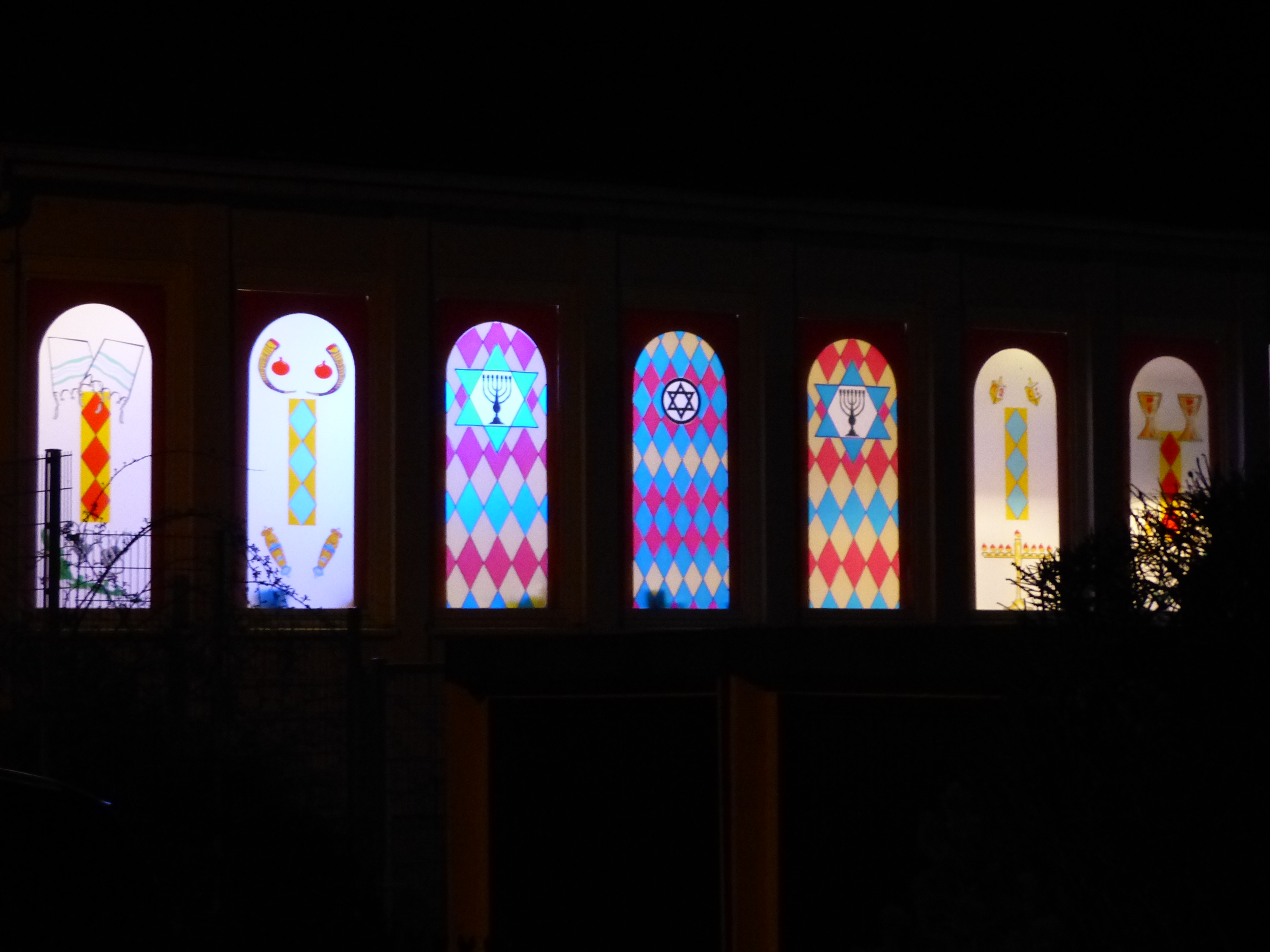 Fenster der Synagoge in Limburg (Lahn)